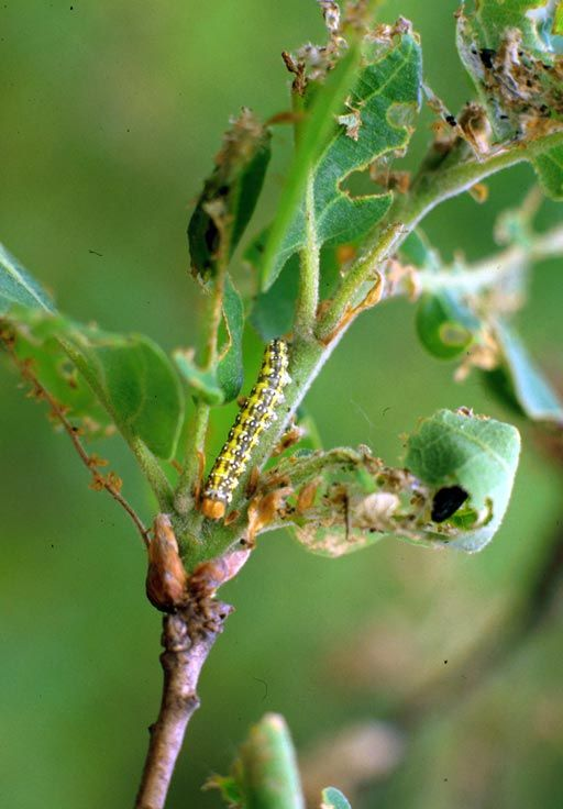 Polyploca ridens, larva